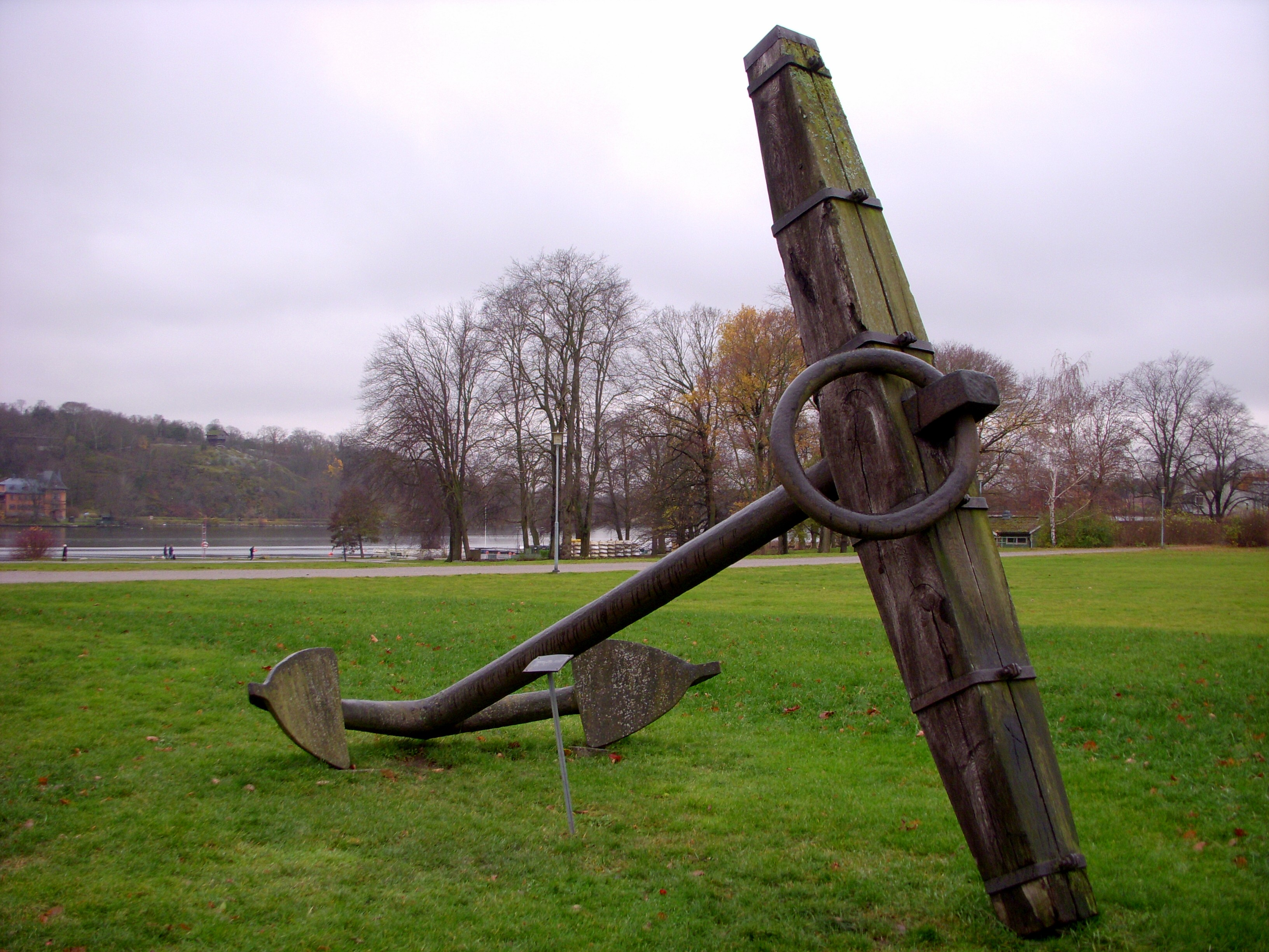 Sjöhistoriska museet i Stockholm, blockankeret